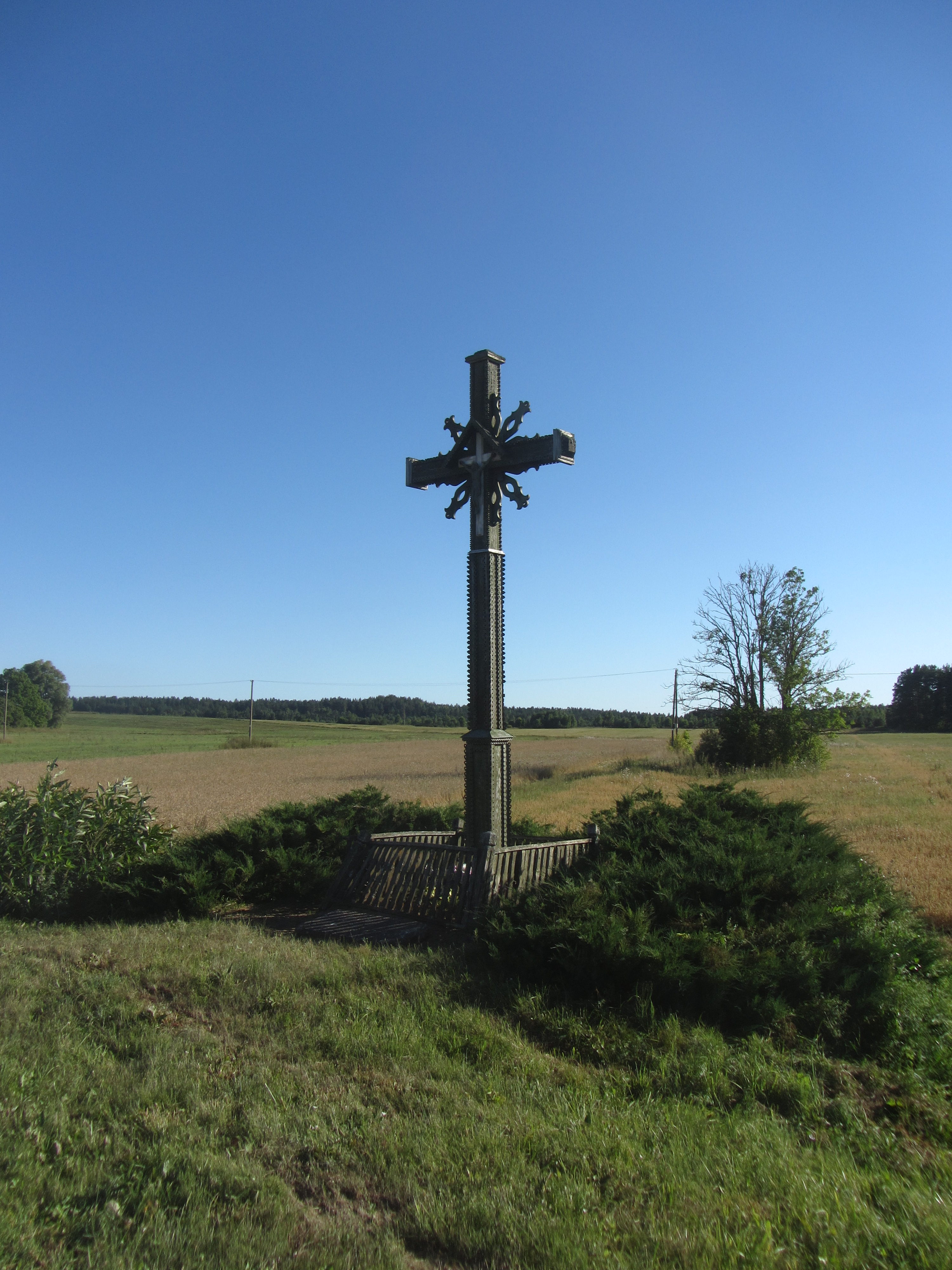 Šimonių sen., Lithuania